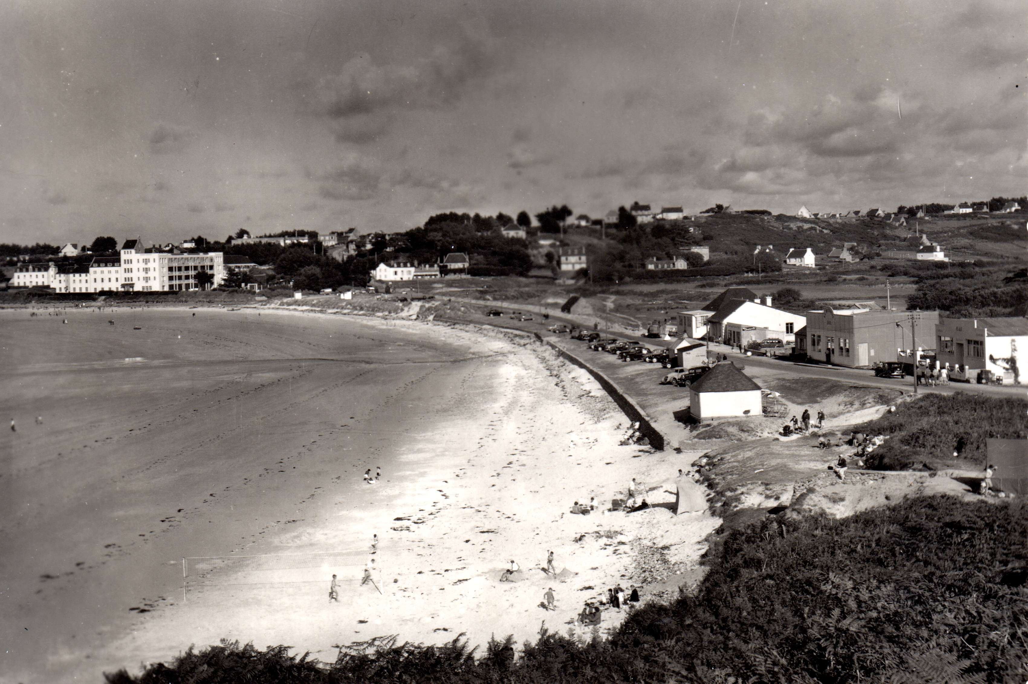 Vue de la plage de Trestel (Trévou-Tréguignec)